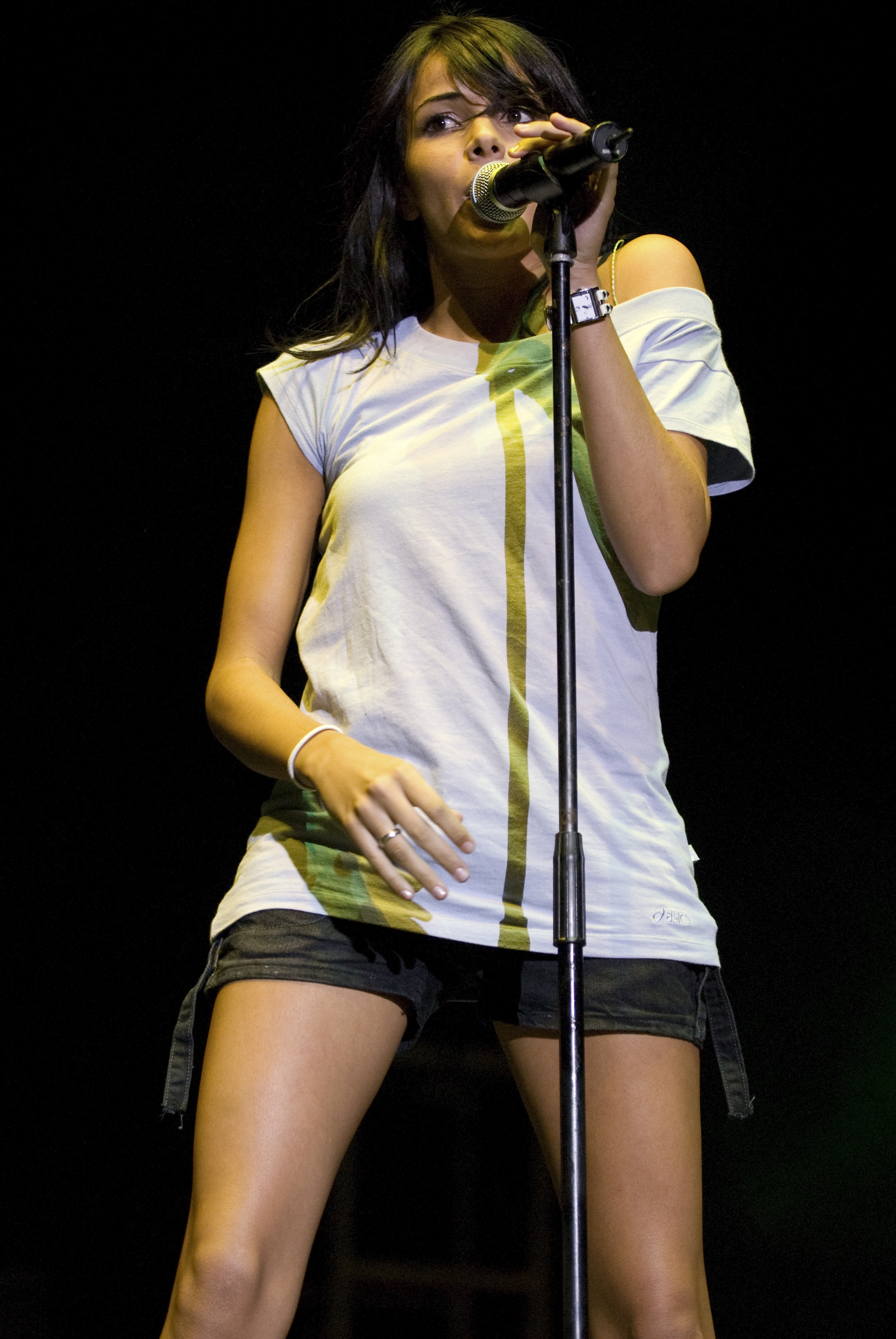 El Sueño de Morfeo